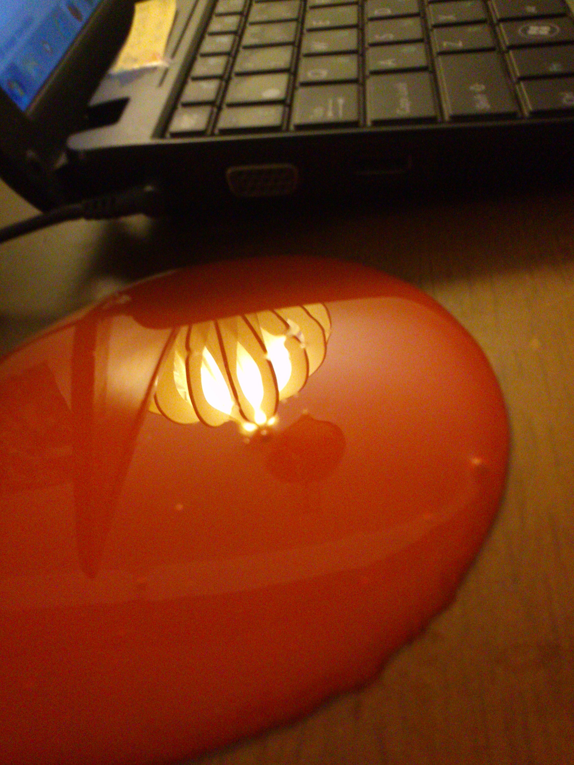 Слим растекшийся по столу